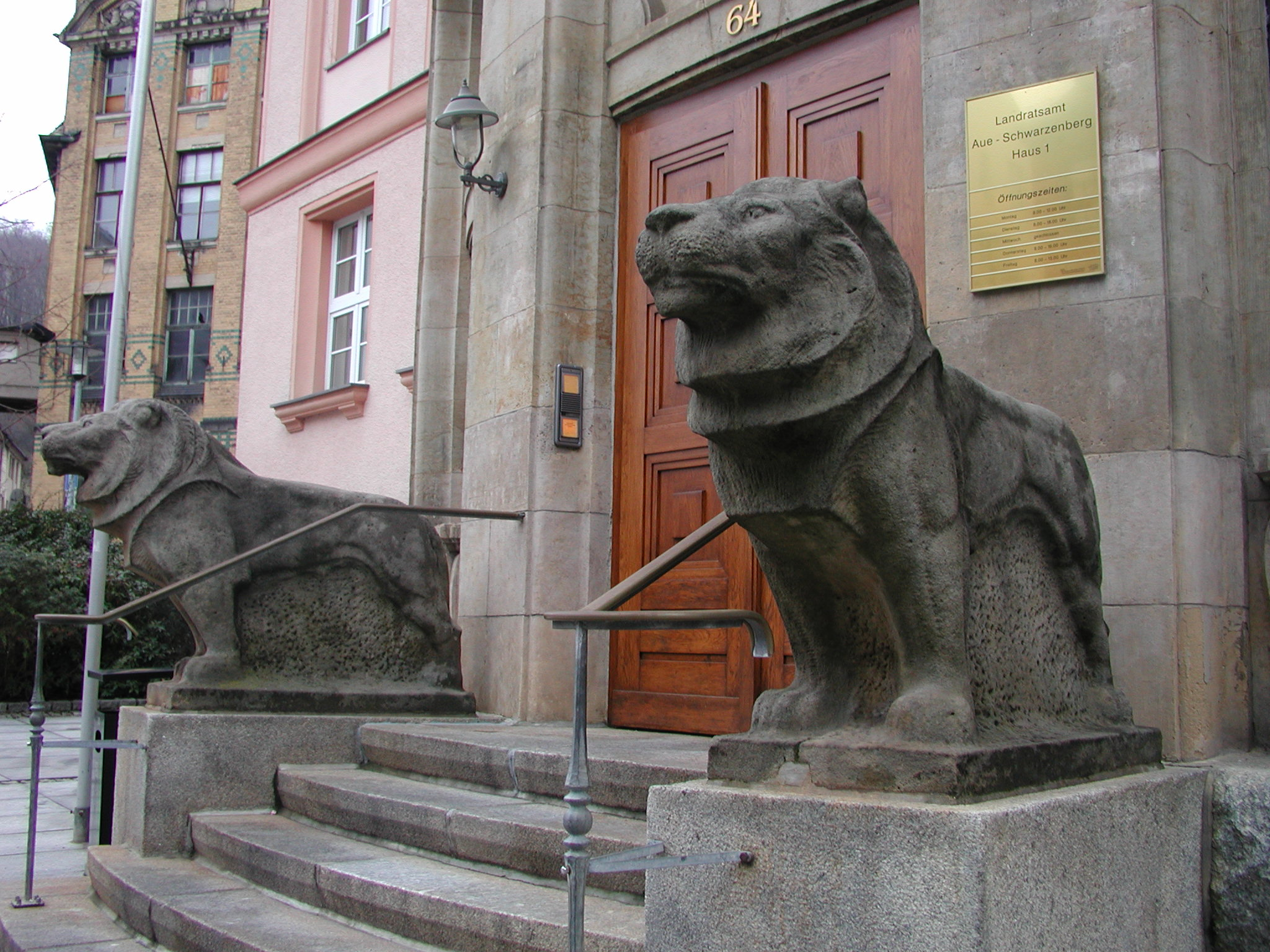 Steinerne Löwen bewachen das Landratsamt